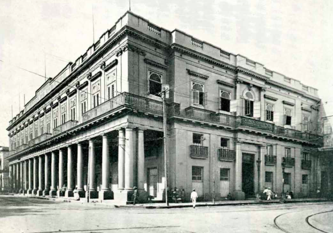 Palacio de Aldama, Habana, Cuba